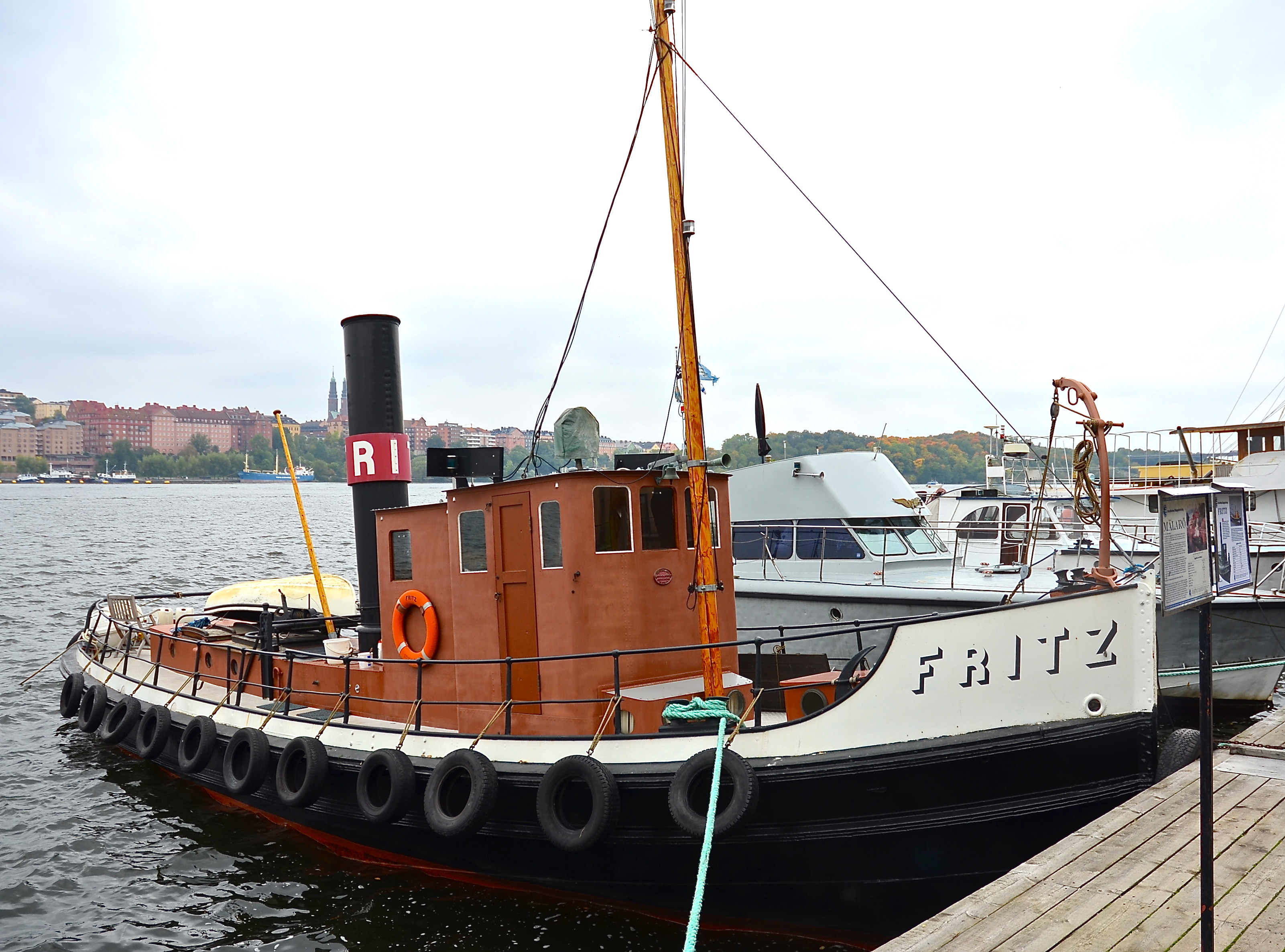 Bogserbåten Fritz vid kaj på Norrmälarstrand i Stockholm This is an image of the protected Swedish ship Bogserbåten Fritz, with call sign SGPW .